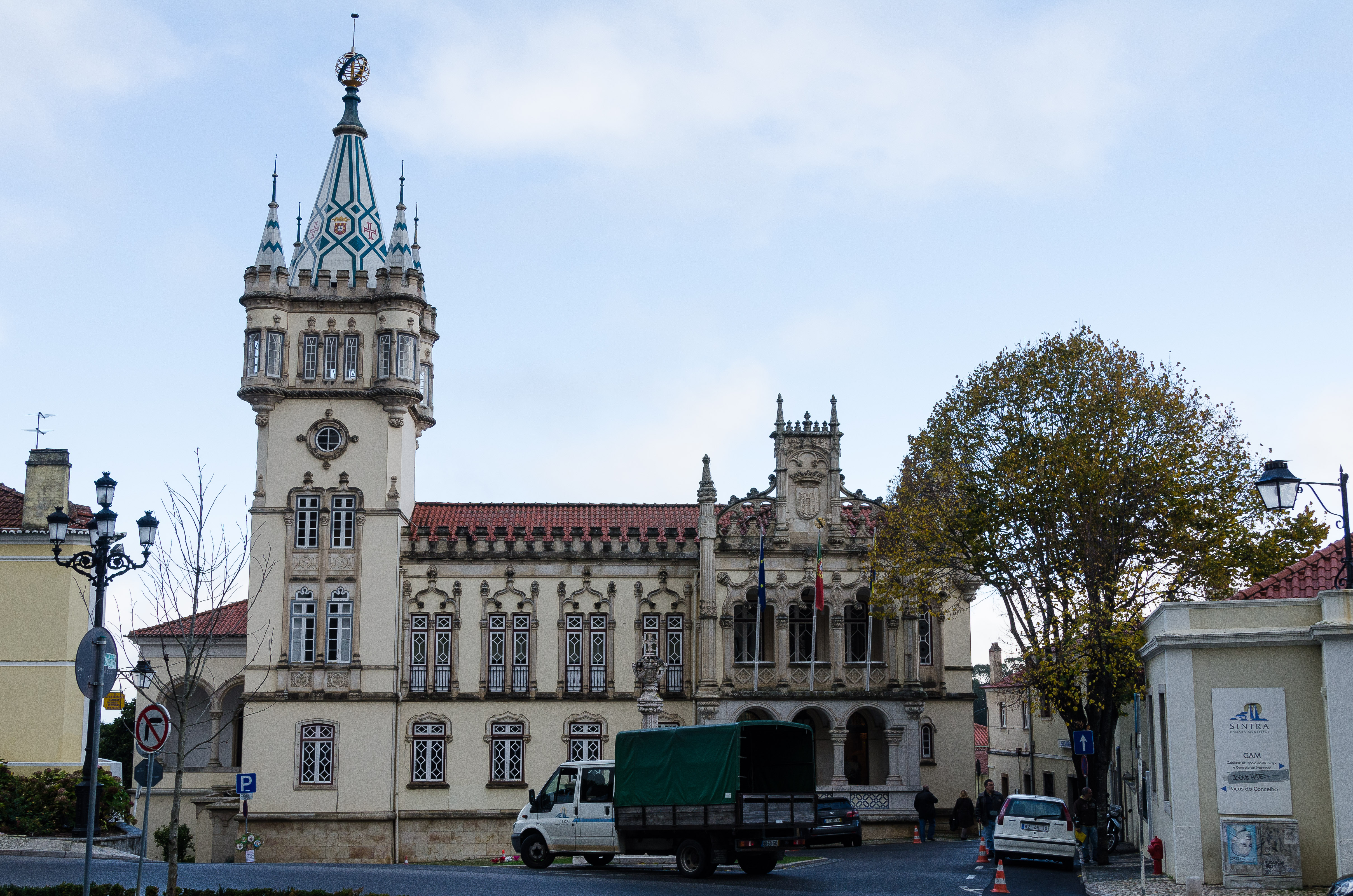 Sintra 020